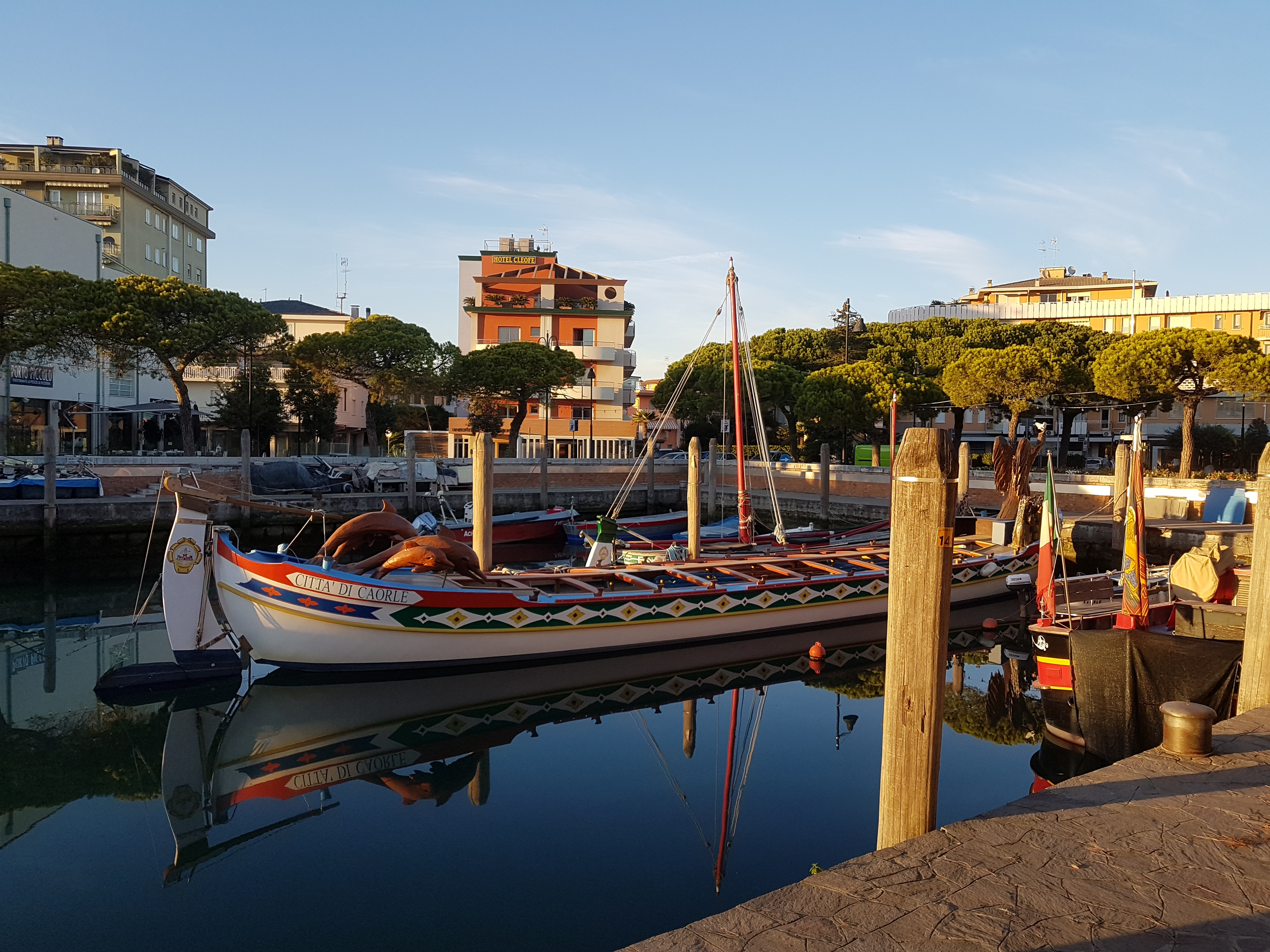 Caorle